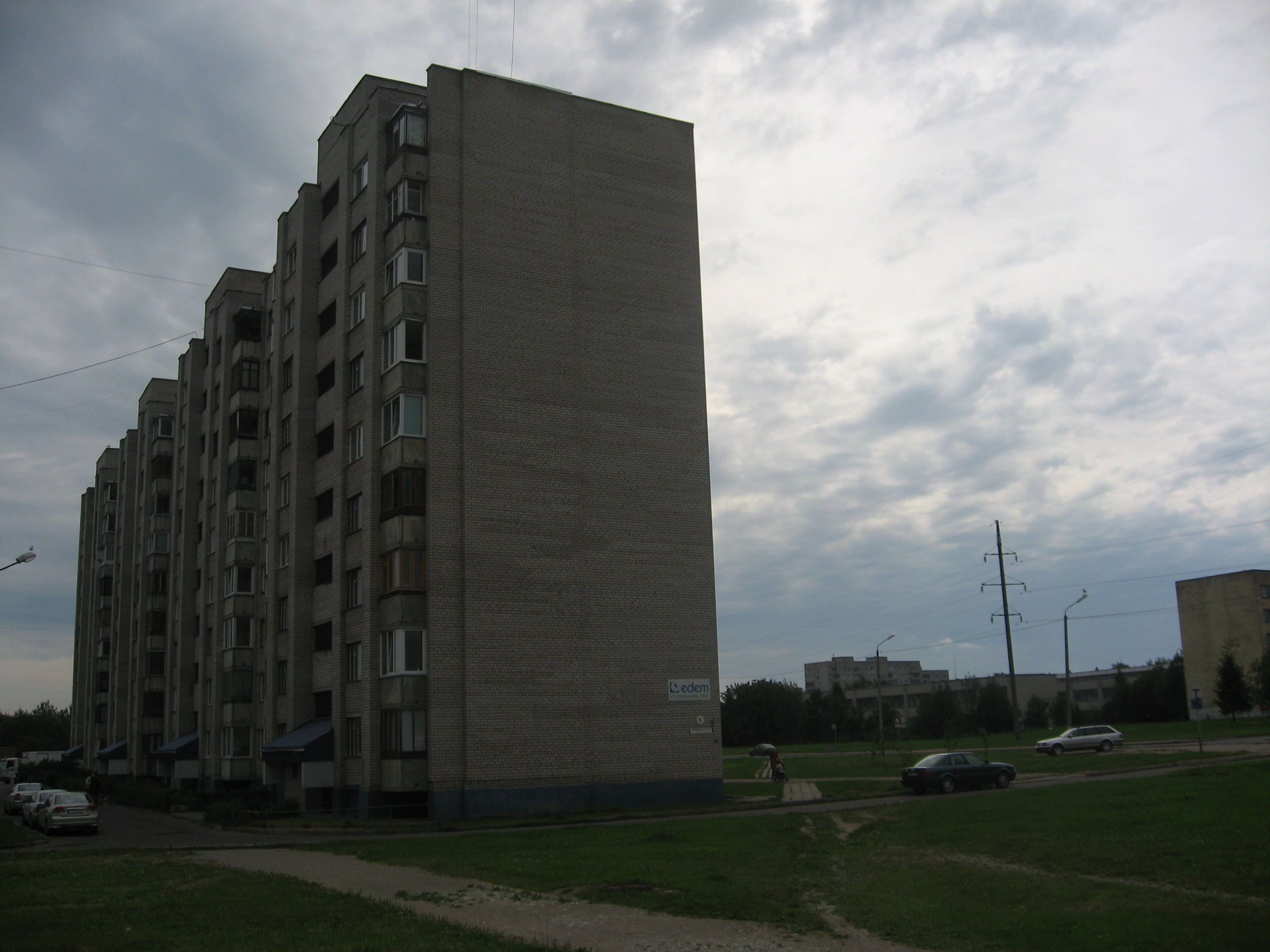 Narva, pro město tak charakteristické paneláky